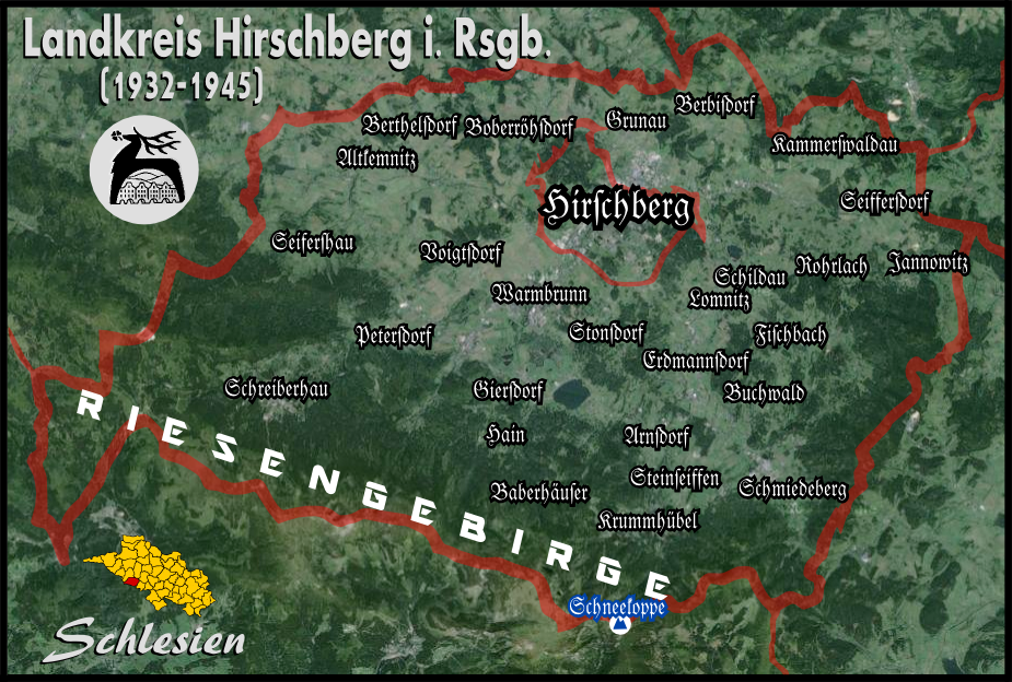 Karte des Landkreises Hirschberg im Riesengebirge. Schläsch: Koarte des Landkreeses Herschbrich.